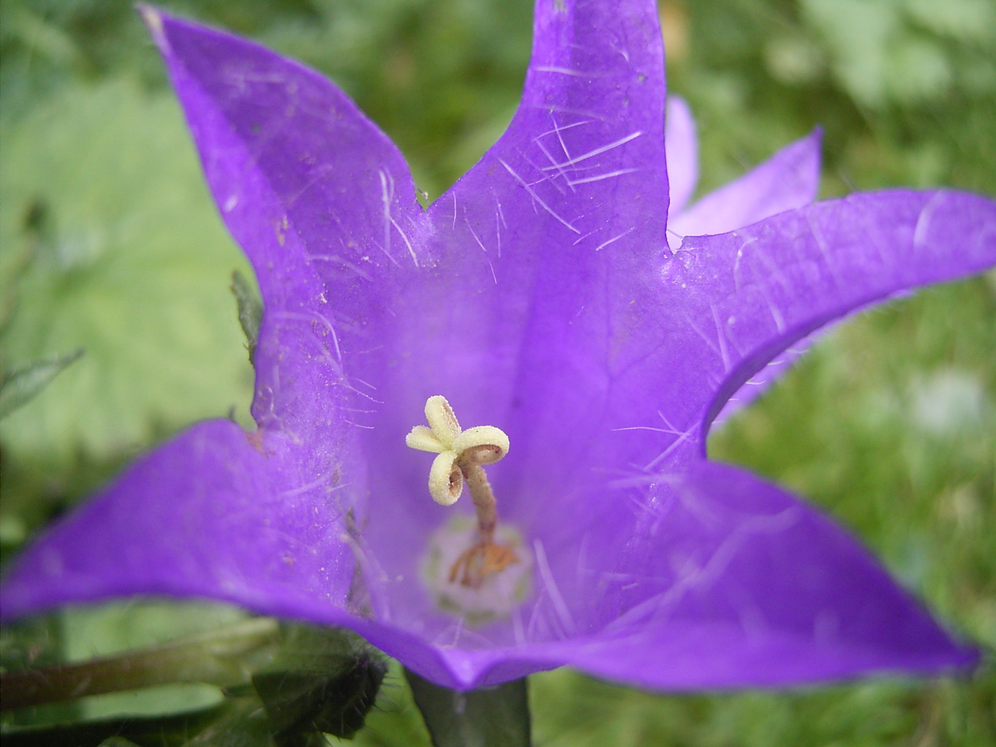 Deze foto toont het Ruig klokje. Ik nam de foto in onze tuin, waar hij ooit is komen aanwaaien. This pic shows Campanula trachelium. I took the pic in our garden, where the wind had brought the seeds.